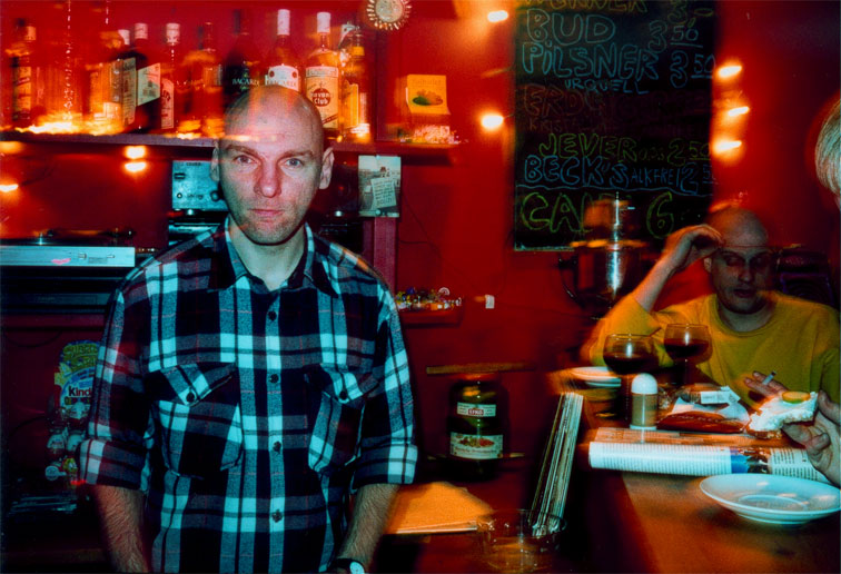 Andreas Gläser im April 2001 im Freudenhaus (Berlin)